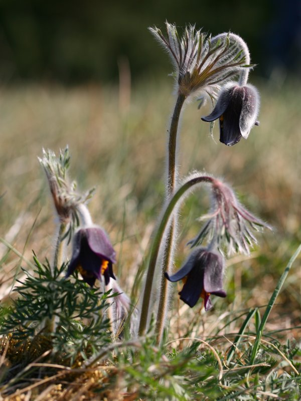 Wiesen-Küchenschelle (Pulsatilla pratensis) im Quassliner Moor